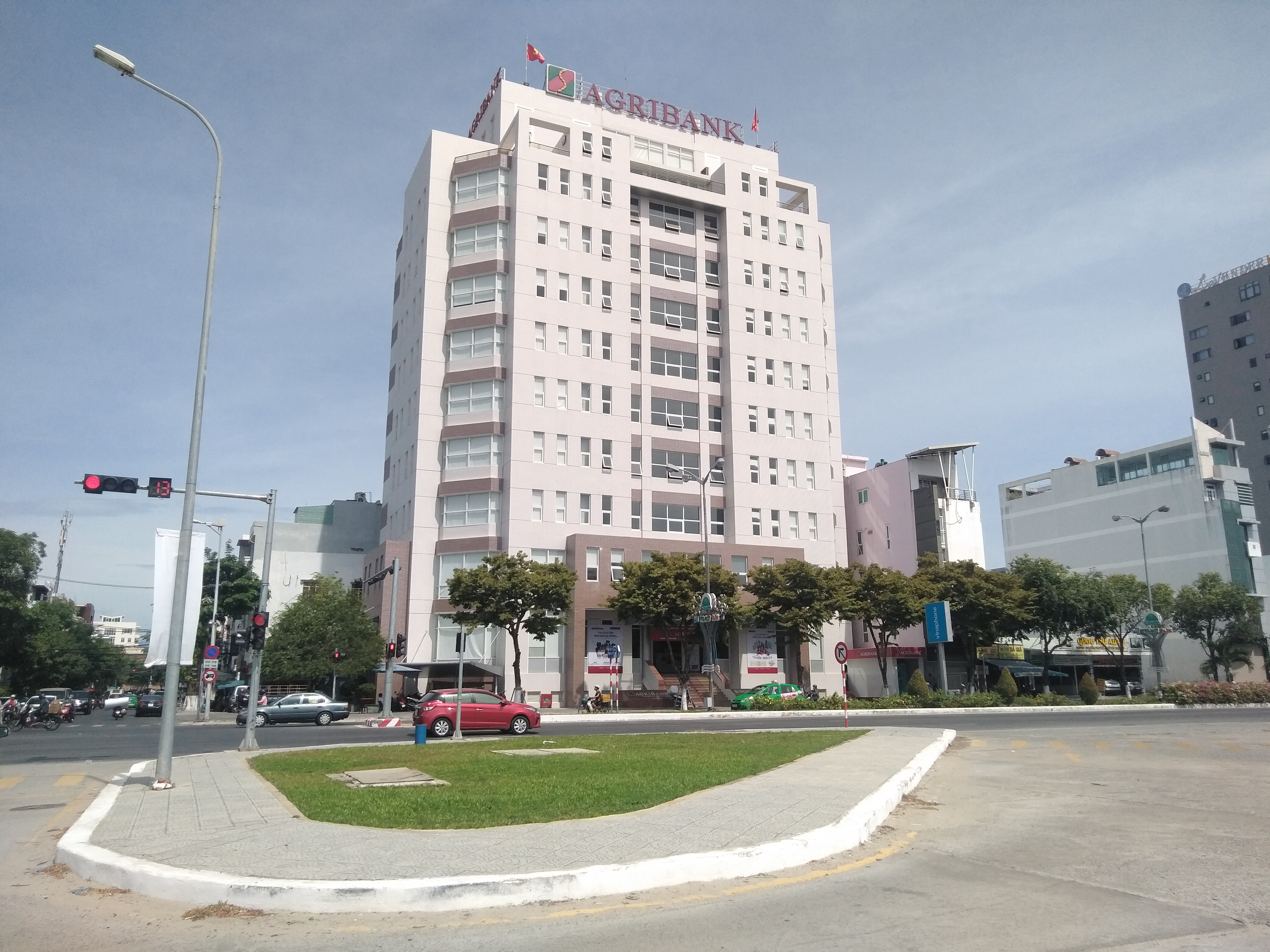 Agribank miền Trung